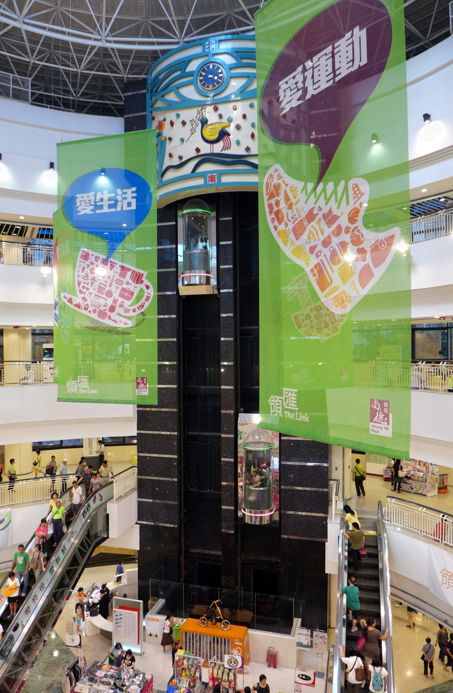 Sheung Tak Plazae Atrium